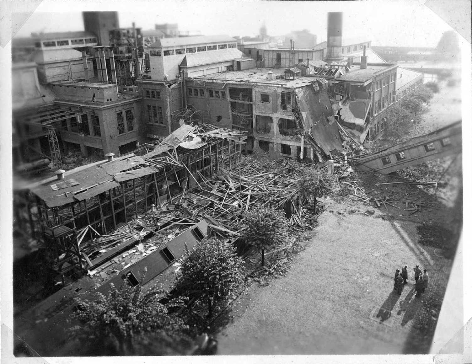 Figur 1. Aarhus Oliefabrik efter bombardementet under 2.verdenskrig